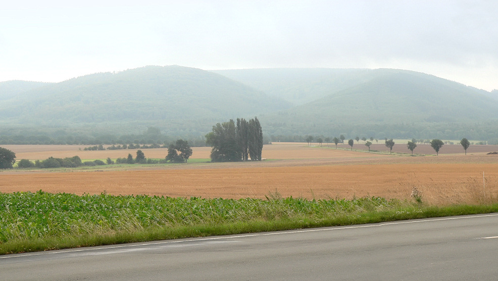 Luttererbecken, etwa 3 km vom Harzrand